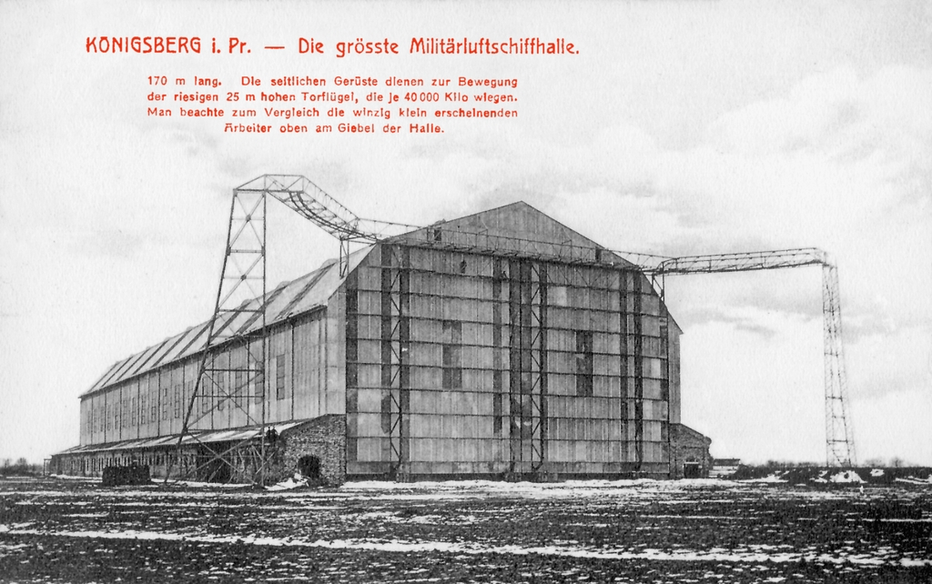 Luftschiffhalle